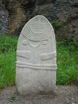 Fac-similé de « La Dame de Saint-Sernin », statue-menhir découverte en 1888 et aujourd'hui conservée au musée Fenaille de Rodez.